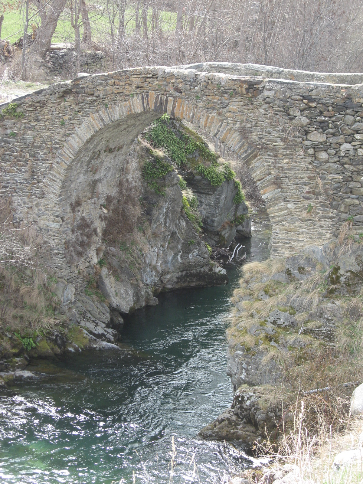 Alós d'Isil: Pont romànic d'Alós d'Isil